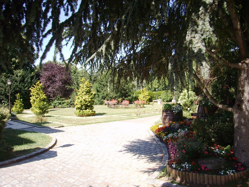 Parc Gravelin de Champlan (91)